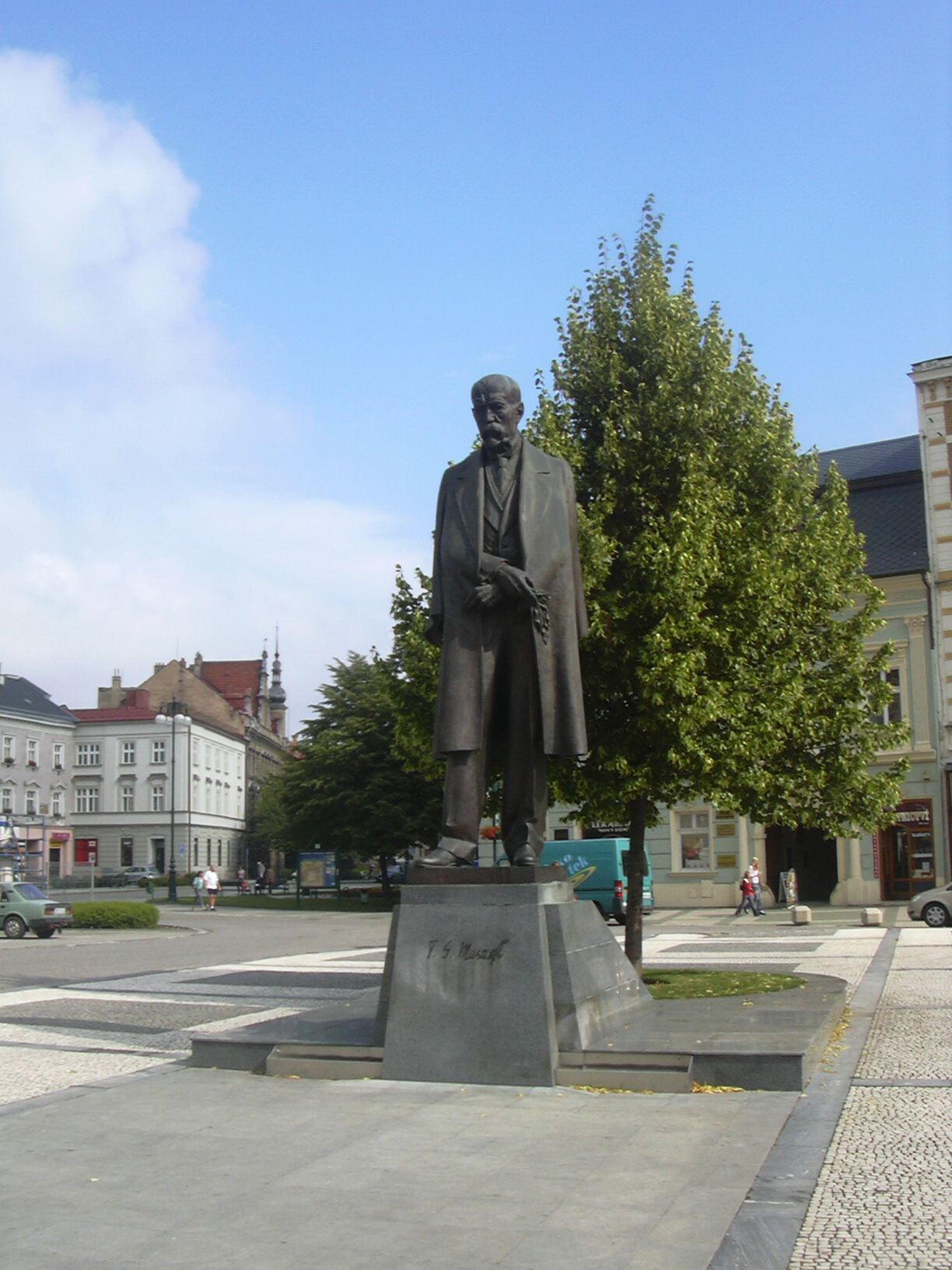 socha TGM (Prostějov- czech republic)